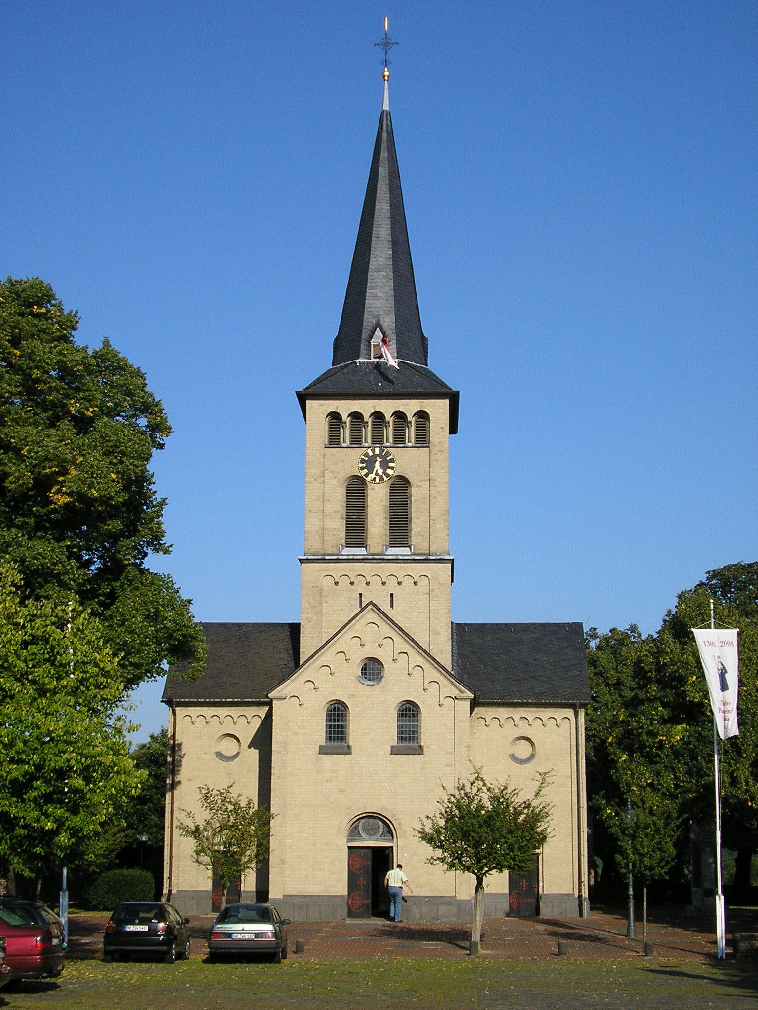 St. Odilia Dormagen-Gohr. Neoromanischer Westbau